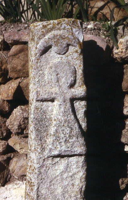 Stèle, Tophet de Carthage, Tunisie